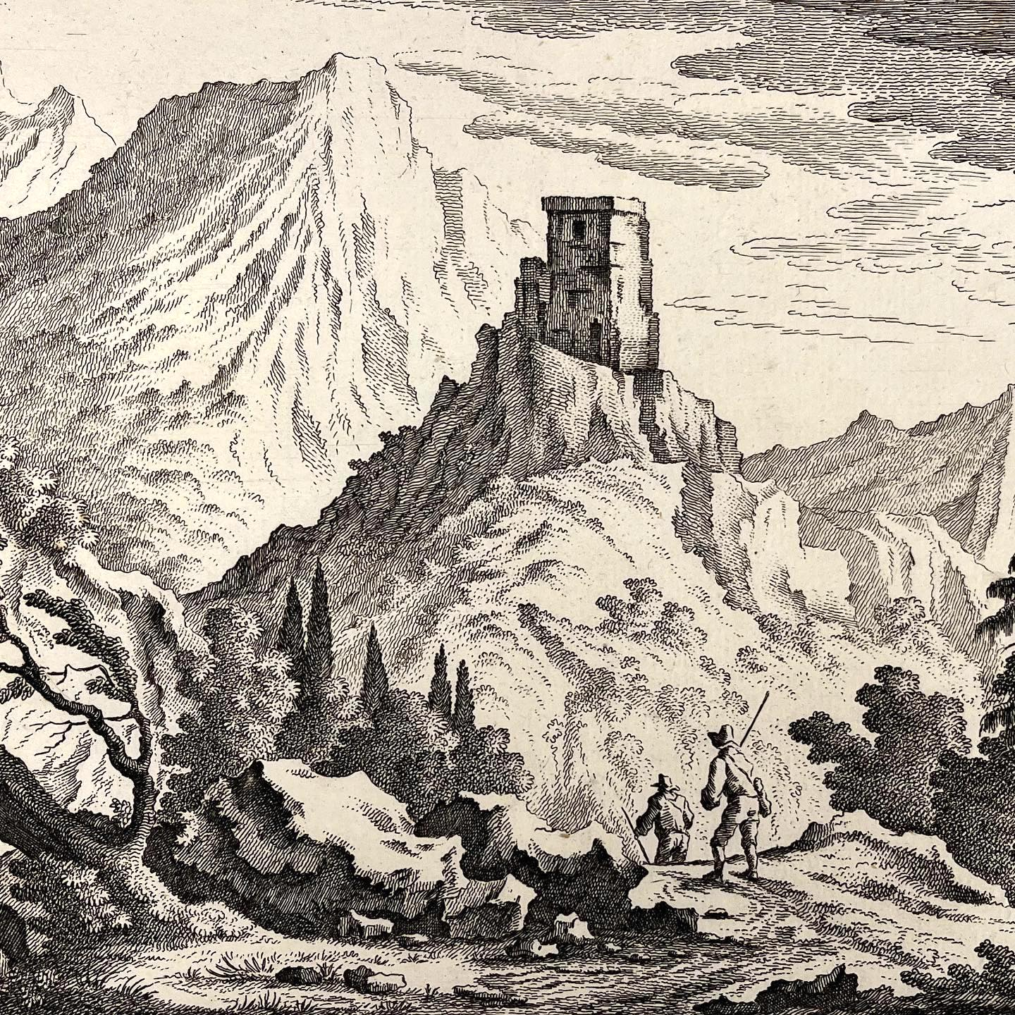 Alt Aspermont, Darstellung von Daniel Düringer